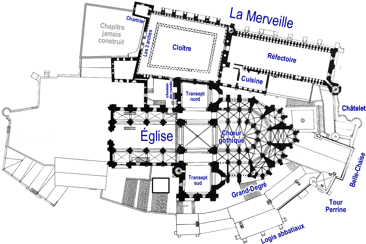 Mont Saint-Michel - Plan au niveau de l'église abbatiale. Plan retouché et légendé par Utilisateur:Emdx d'après l'édition anastaltique de "Le Mont Saint-Michel"(1910) de Paul Gout (1852-1923).